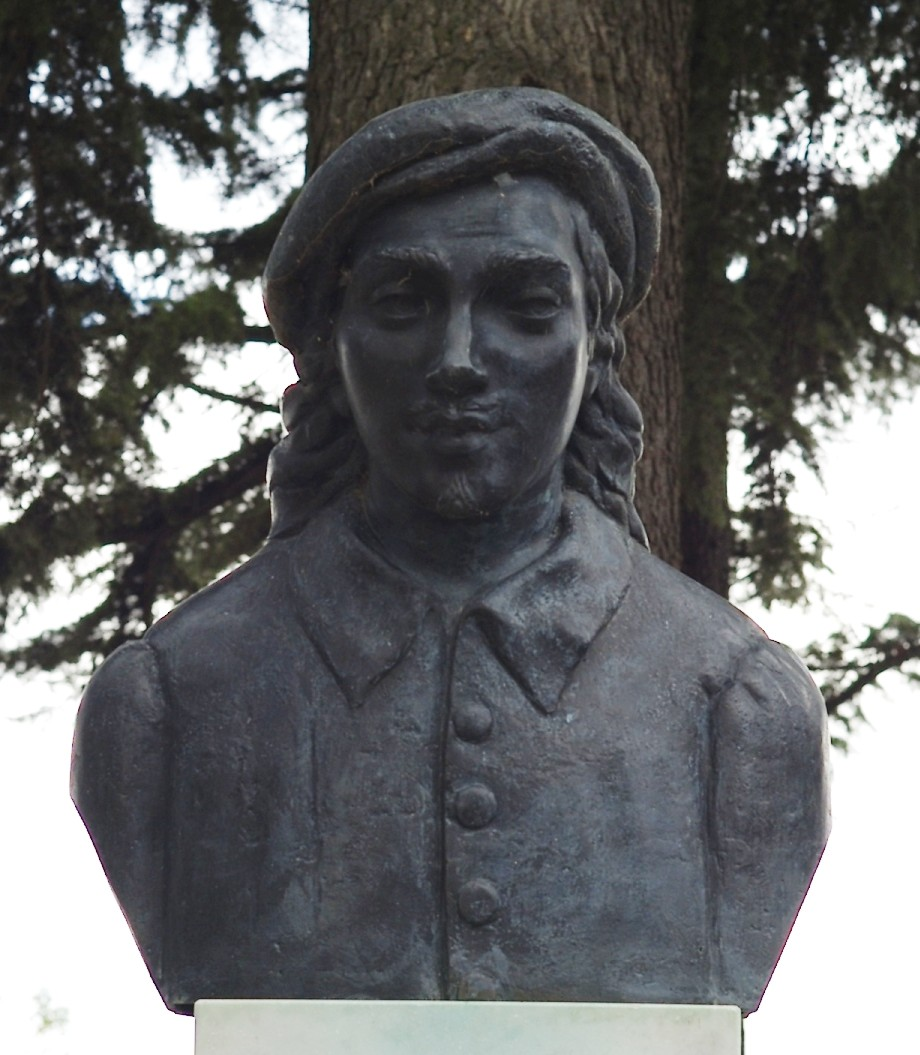 Il busto di Federico Brandani a Urbino